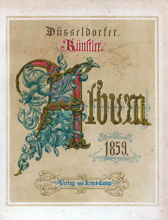 Düsseldorfer Künstler-Album, 9. Jg. 1859, Kupfertitel gezeichnet von Alwine Schroedter (vergl. Inhaltsverzeichnis)